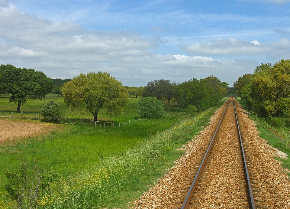 Linha do Alentejo PK 95